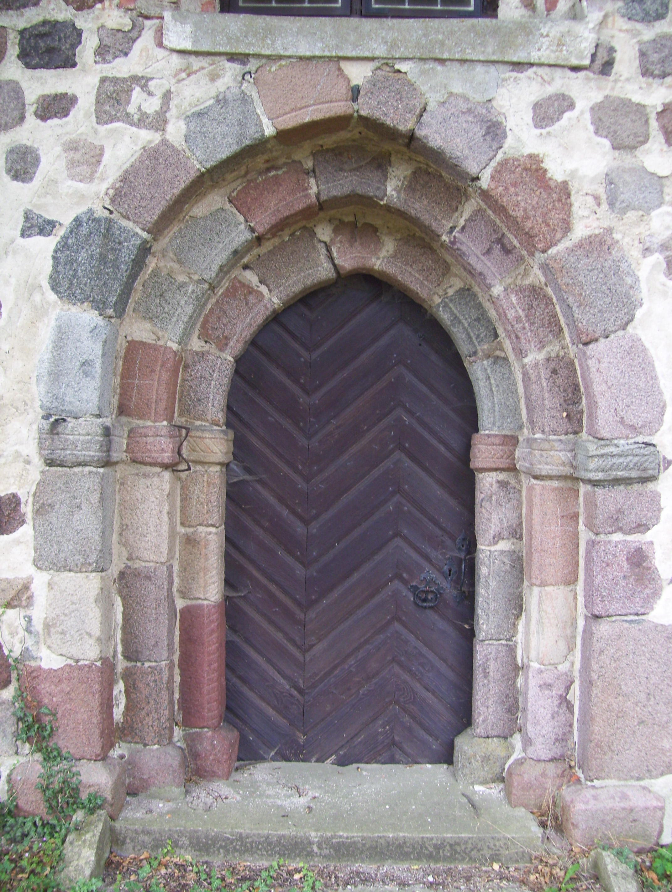 Kirche in Brohm, Friedland (Mecklenburg), östliches Portal an der Südseite